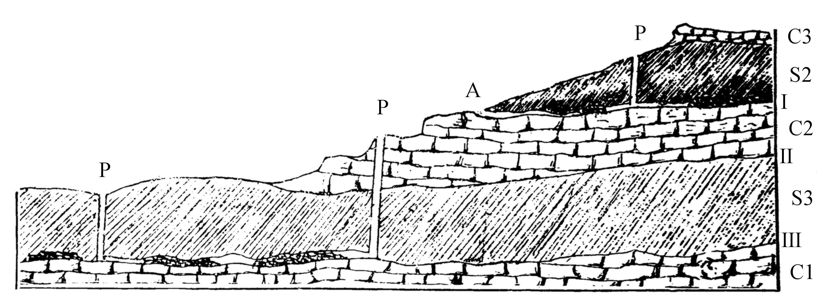 Coupe théorique des terrains du Laurion ; photographie d'une illustration de l'ouvrage libre de droit Edouard Ardaillon Les mines du Laurion dans l'Antiquité, Fontemoing, Paris, 1897, p. 14